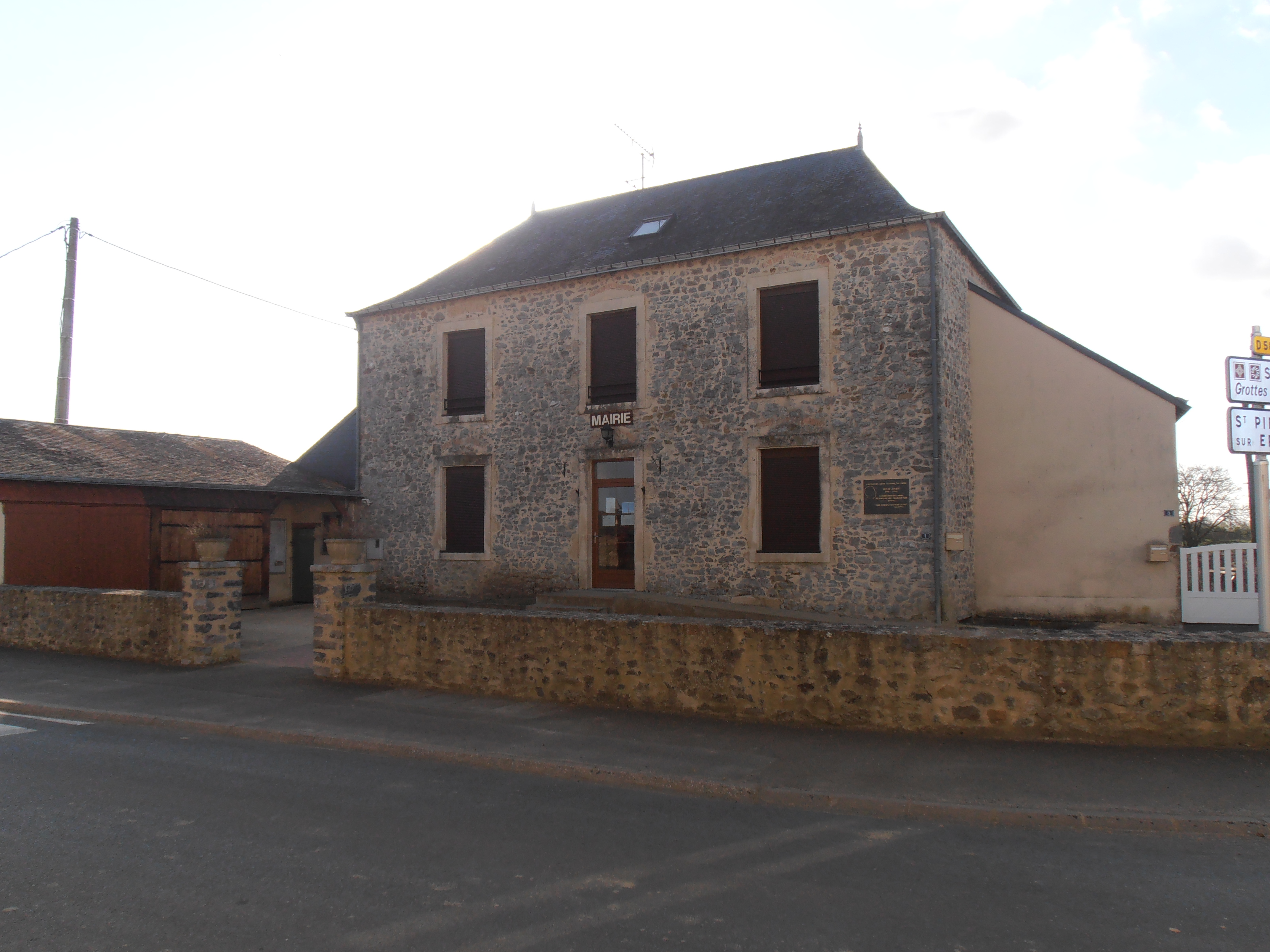 La maison de Thorigné